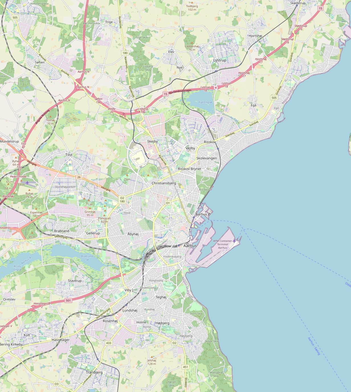 Kort over Aarhus. N 56.2643 S 56.0812 Ø 10.3484 V 10.0539